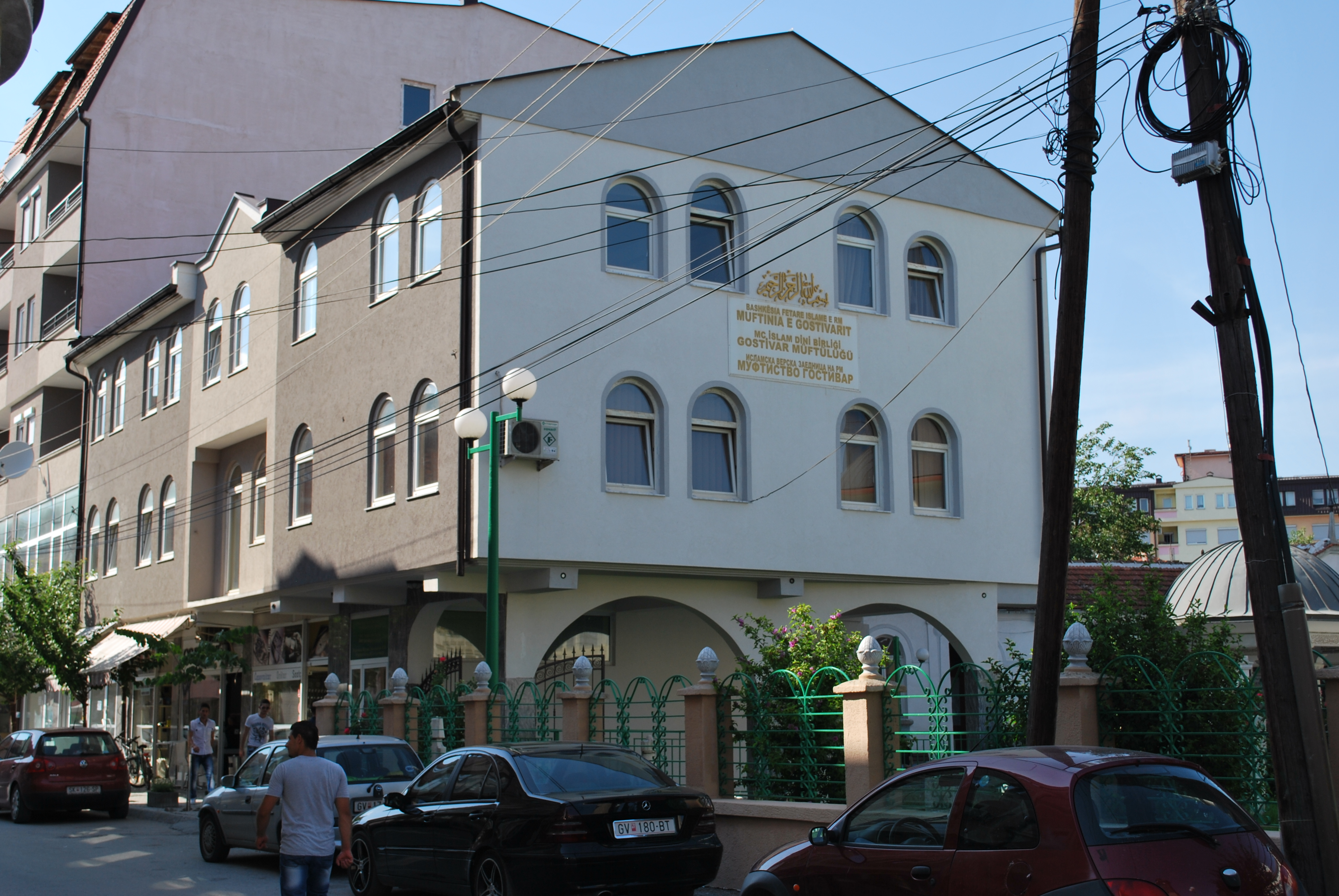 Гостиварското муфтивство